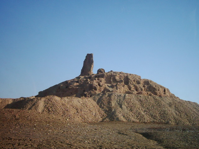 برج أثري في بورسيبا